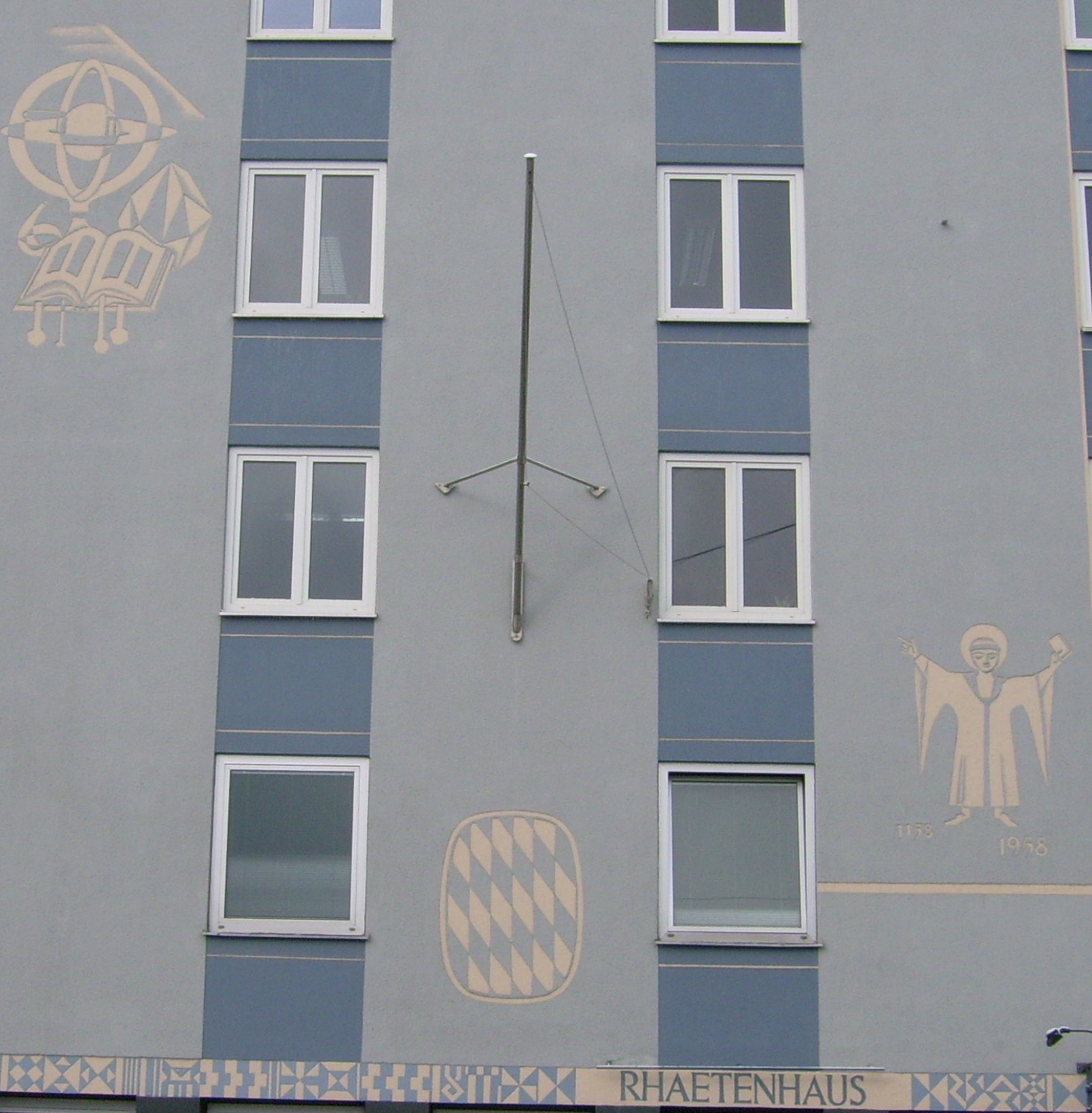 Rhaetenhaus